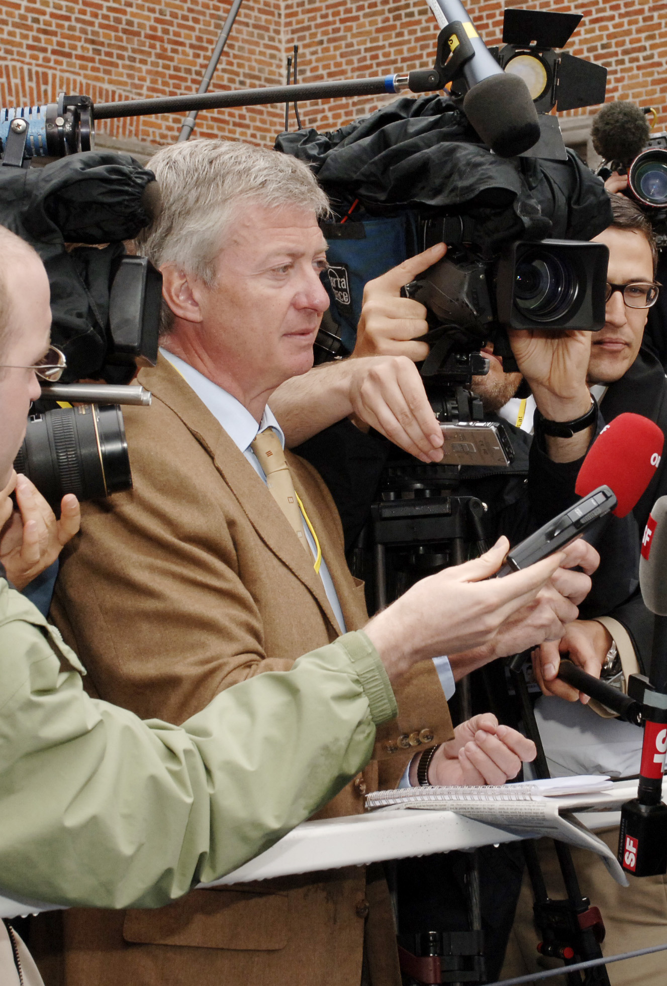 EPP Sumiit 15 May 2006